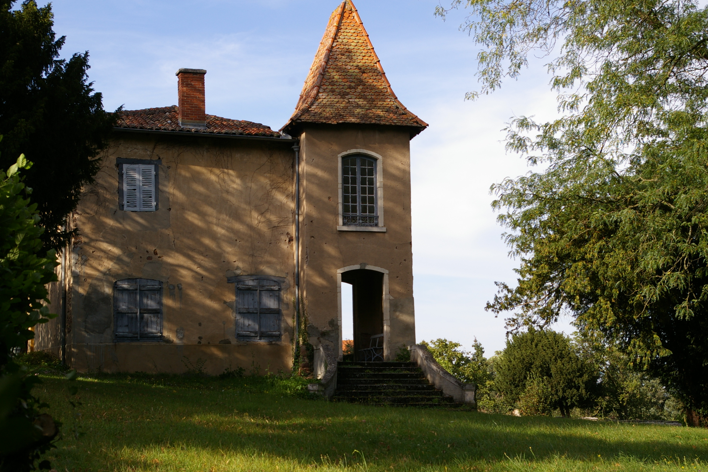 Maison de la Prévôté, (Inscrit, 1990) .